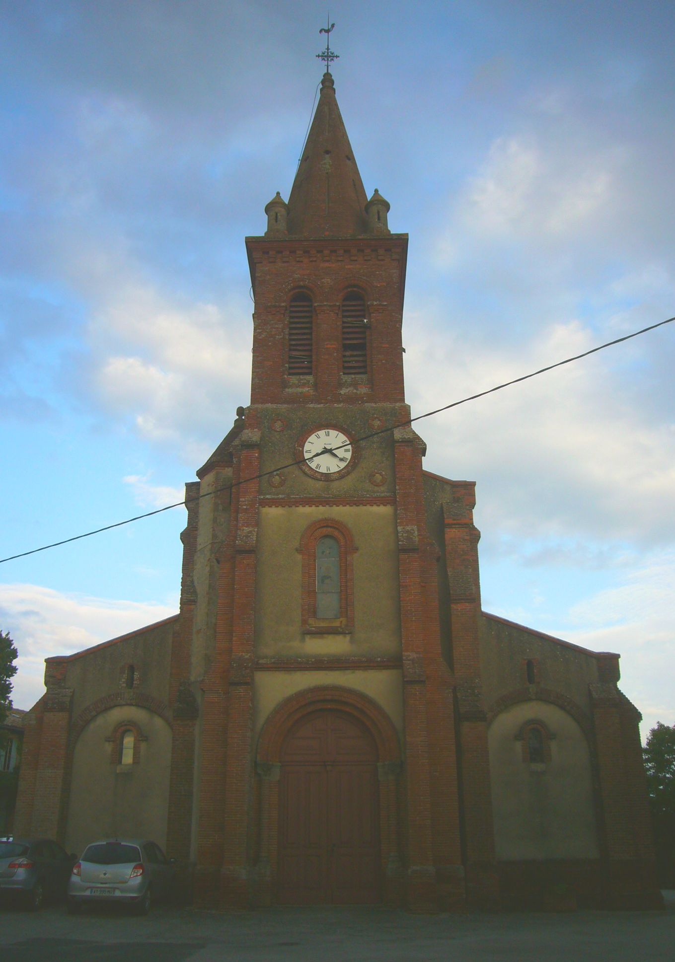 Le clocher de l'église de Teyssode